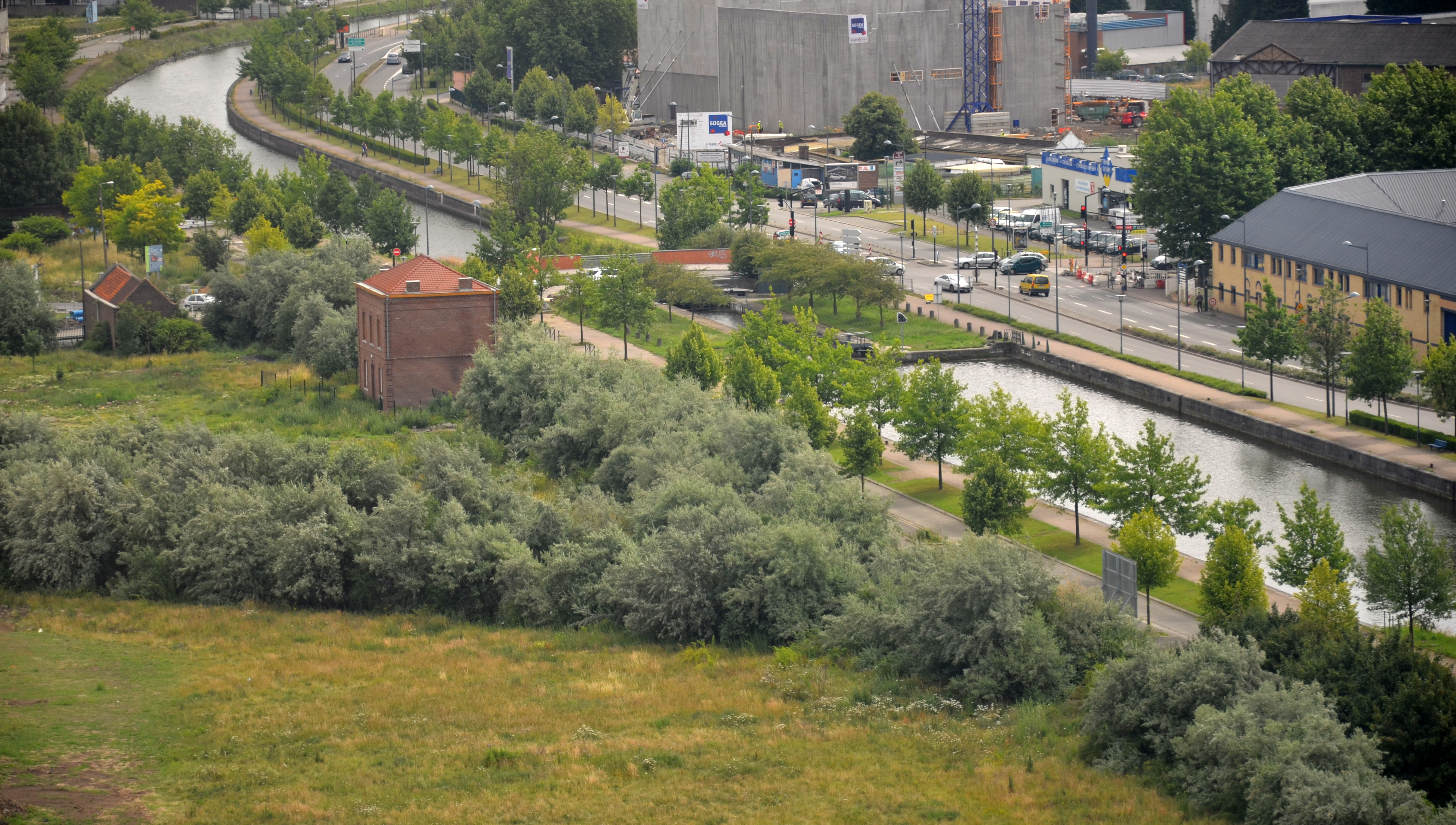 Zone de l'Union, 2011/06/21, canal et écluse. Un centre d'interprétation et Maison du Canal sont prévus, avec un centre de gestion prévu dans l'ancienne maison éclusière de l'Union Il suivra les manœuvres des écluses et des ponts mobiles sur la partie française du canal., avec visites de groupes possibles (sur réservation). Une documentation et outils d'interprétation de l'histoire du canal devraient être rassemblés et présentés sur un autre site. Le canal jouera un rôle dans la trame bleu de la zone de l'union.